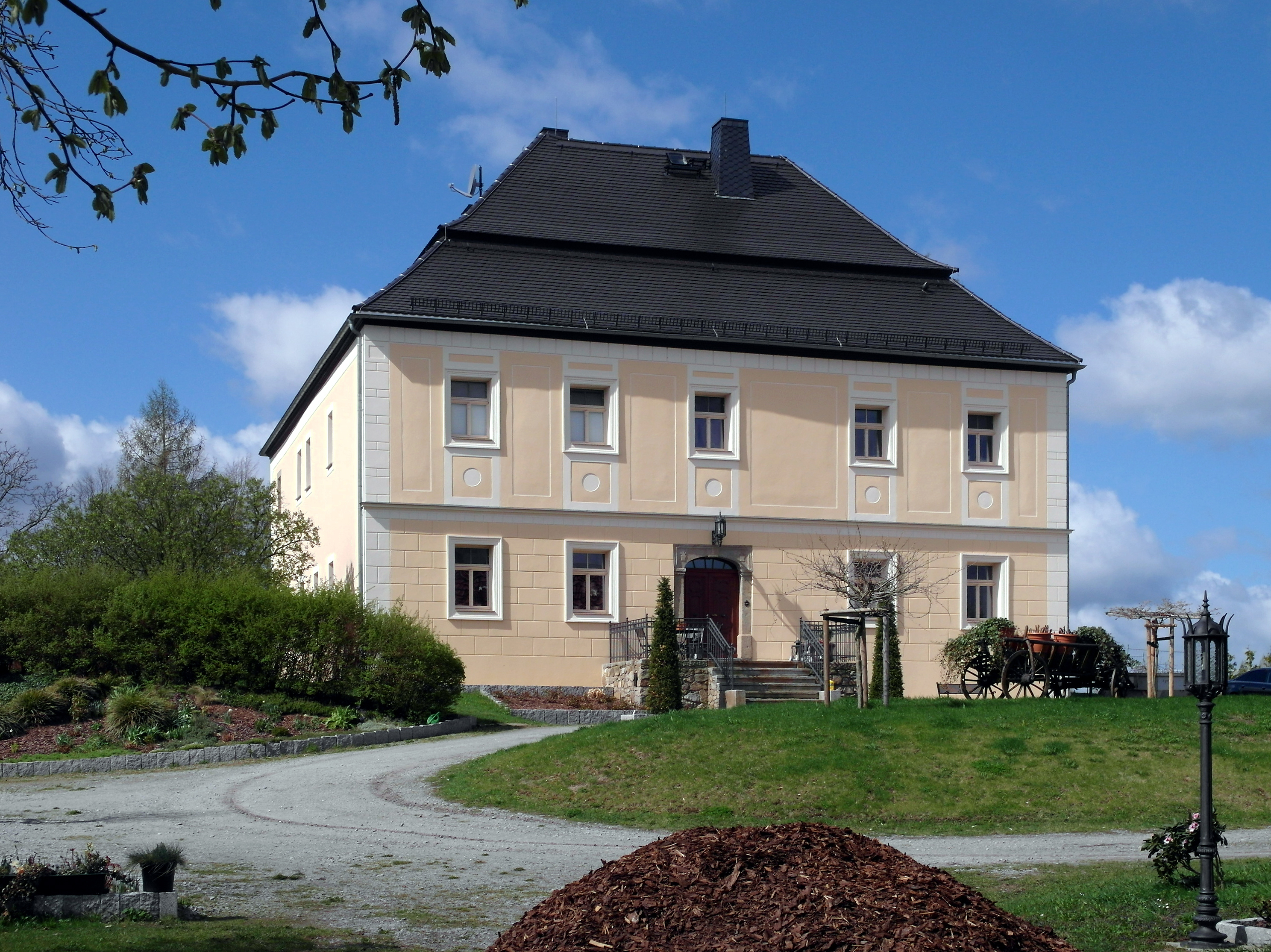 06.04.2017 02692 Obergurig, Hauptstraße 2 (GMP: 51.131129,14.403897): Rittergut, Herrenhaus (18.Jh.), Sicht von Osten. [SAM9214.JPG]20170406275DR.JPG(c)Blobelt